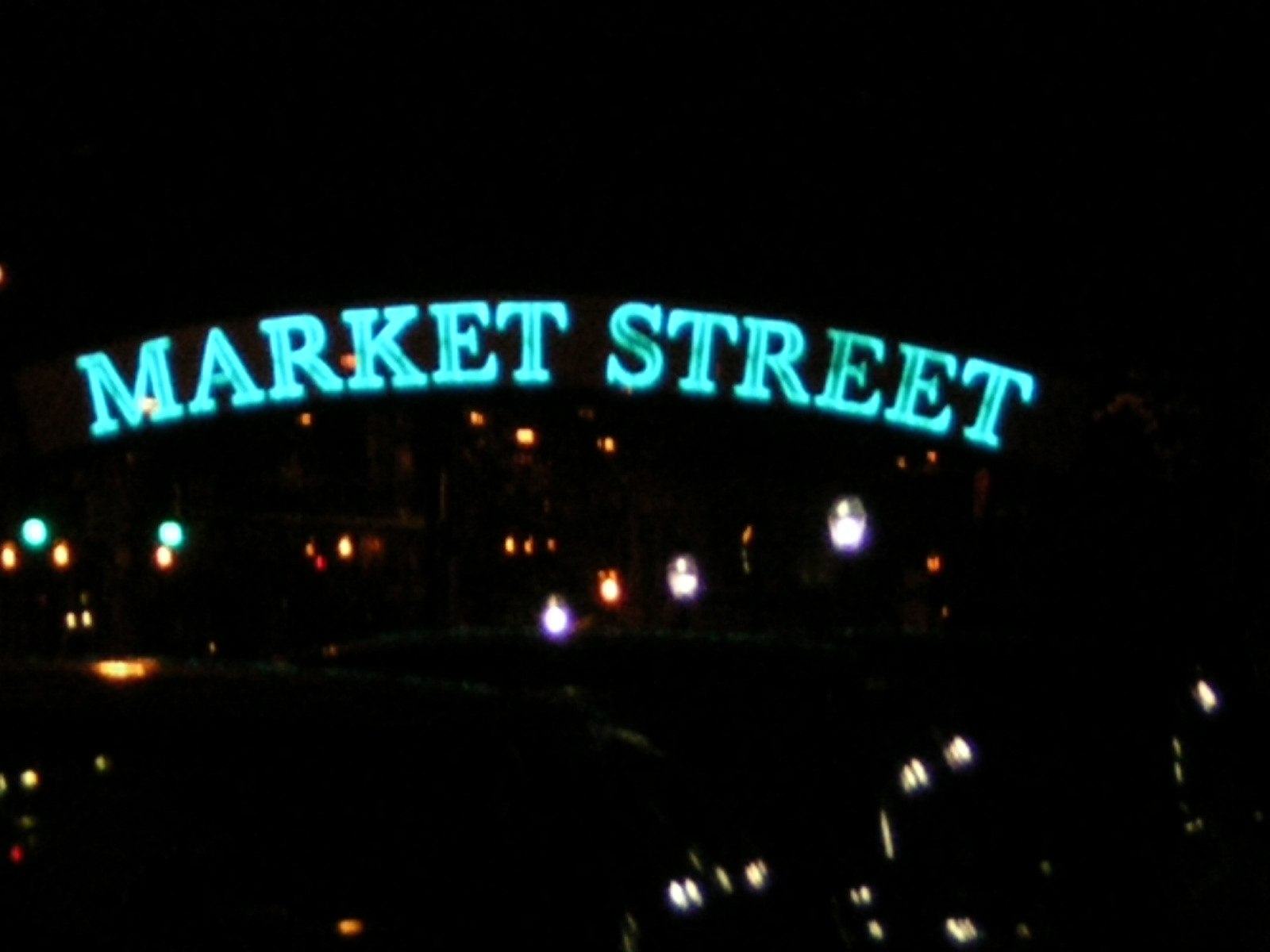 no description on flickr page